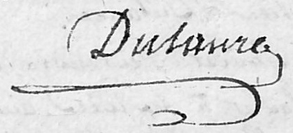 Signature de l'historien et homme politique Jacques Antoine Dulaure. Archives nationales, minute notariale, MC/ET/XLIII/737